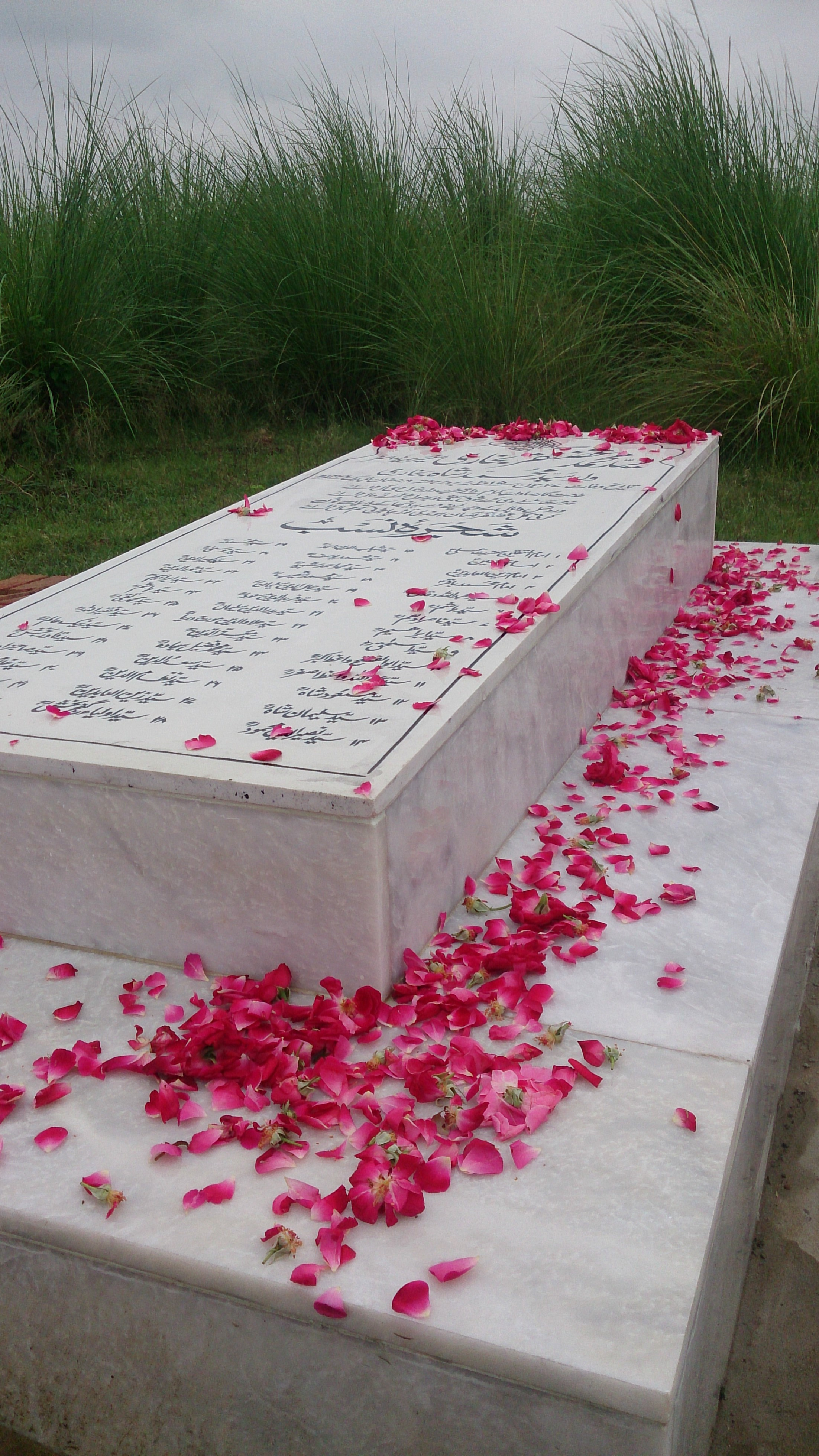 مرقد مبارک حکیم،استاد،شاعر جناب سید محمد غضنفر شاہ بخاری گجرارت